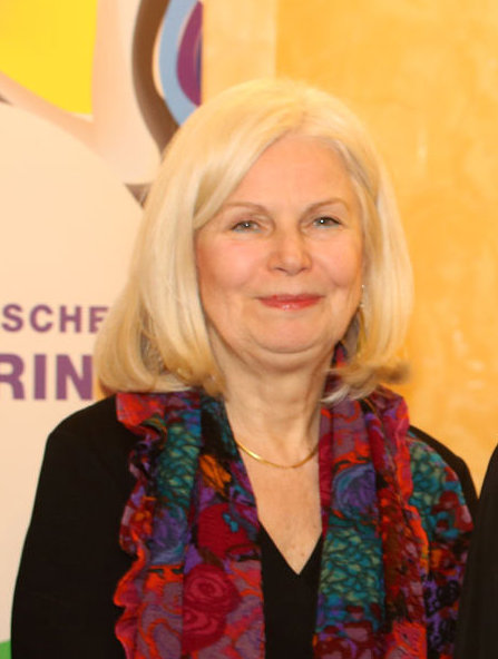 Elfriede Hammerl, Susanna Kirchmayr-3895